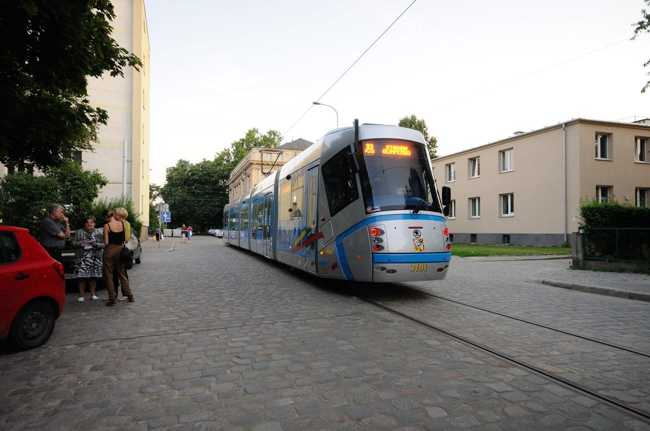 Dwukierunkowa Skoda 19T na trójkącie na ulicy Wierzbowej – linia 33+.